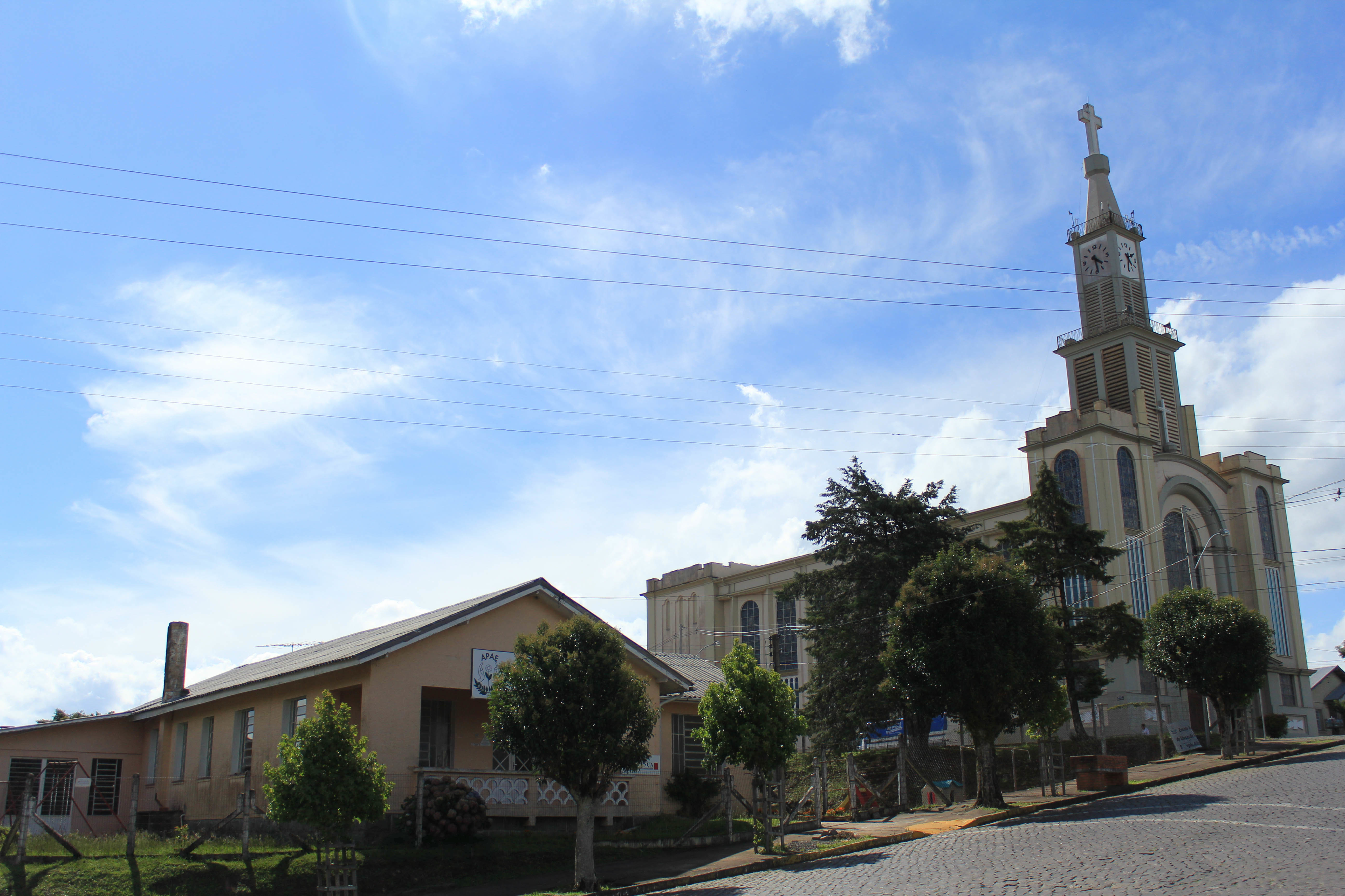 Church in São Francisco de Paula